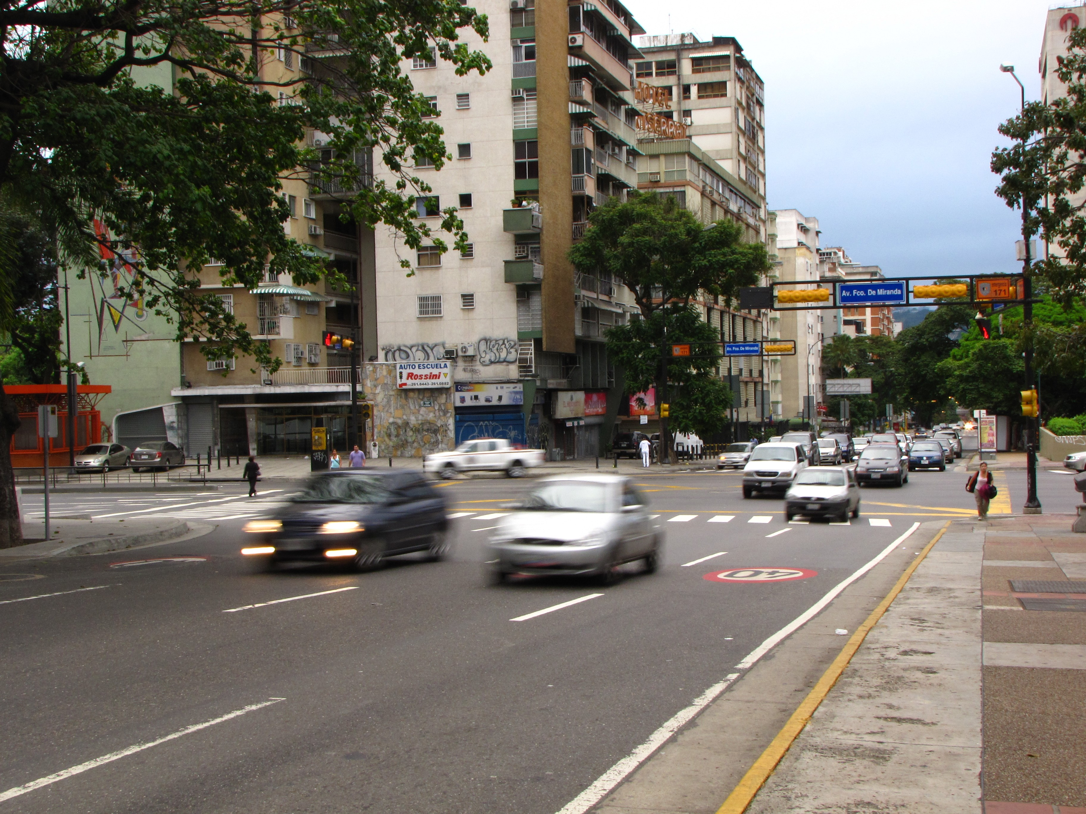 Avenida Luis Roche, intersección con Avenida Francisco de Miranda. Plaza Altamira, Caracas, Venezuela.